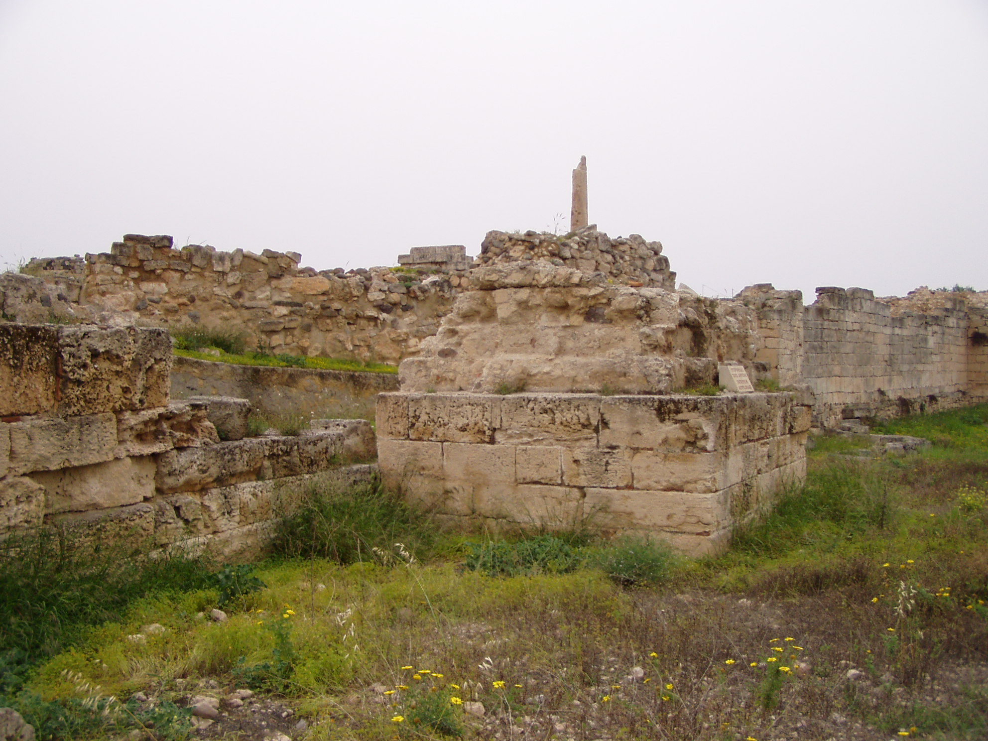 Apollontempel auf Ägina, Blick von Nordosten